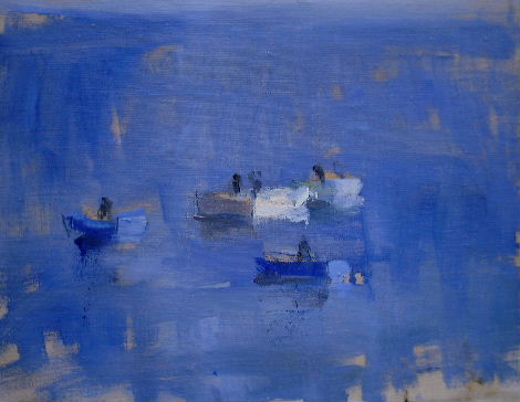 Båtar i Viks hamn, konstnär Torsten Erasmie